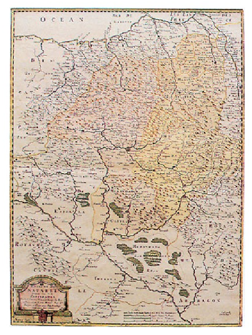 “Royaume de Navarre divisée en six merindades”. Sansson d’Abbeville, 1652. Garai hartako kartografia-tekniken arabera moldaturiko mapa politikoa, Nafarroako lurraldearen kokaera eta luze-zabalera zehaztasunik gabe ematen dituena. (Argazkia: J. G. Bilduma: J. R. S.).